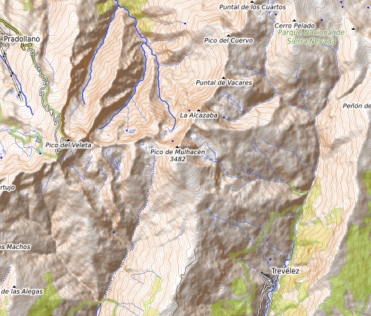 carte réalisée sur umap This map may be incomplete, and may contain errors. Don't rely solely on it for navigation.